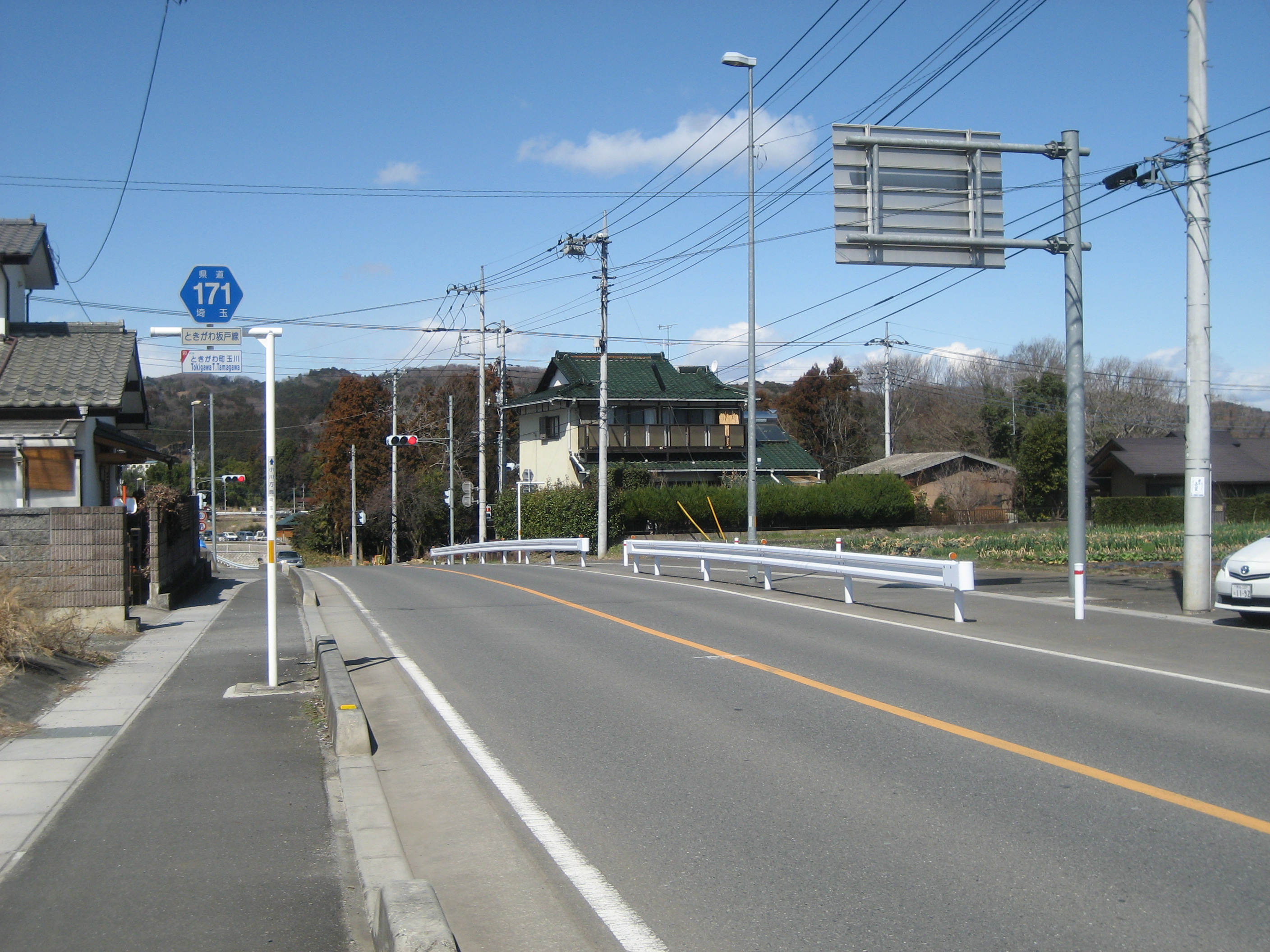 埼玉県道１７１号線ときがわ町内